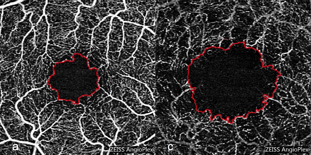 Fig 2. Evaluación de la zona avascular foveal (FAZ). (A)Tomografía coherencia óptica de capa capilar superficial (SCL) con zona avascular foveal (FAZ) bordeada en rojo. (C)Tomografía coherencia óptica de capa capilar profunda (DCL) con zona avascular foveal (FAZ) bordeada en rojo.